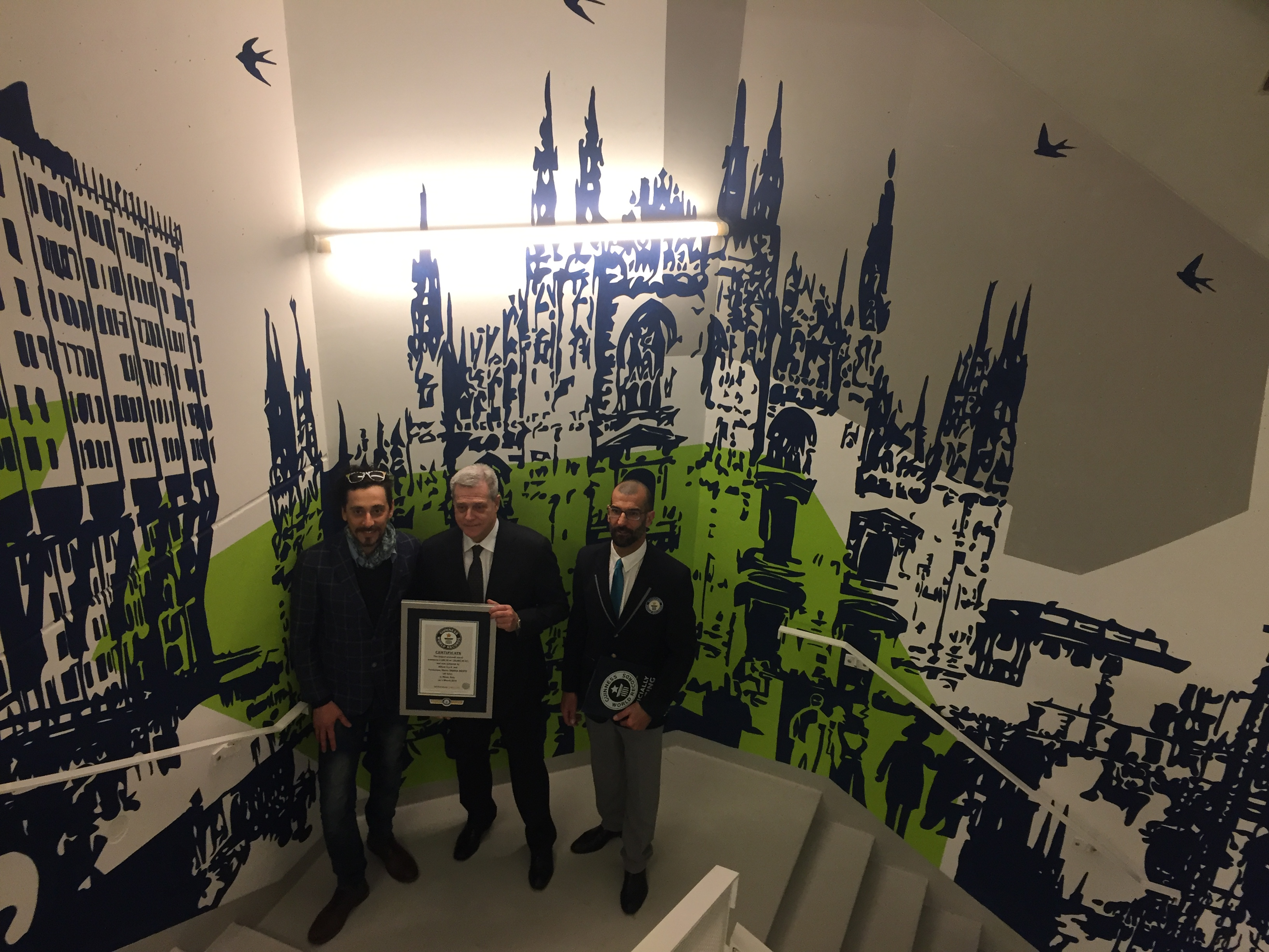 Il giudice del GUINNESS WORLD RECORDS® assegna il titolo di più grande murale del mondo lungo le scale di un edificio - Largest stairwell mural ad Allianz Italia e alla Fondazione Allianz UMANA MENTE